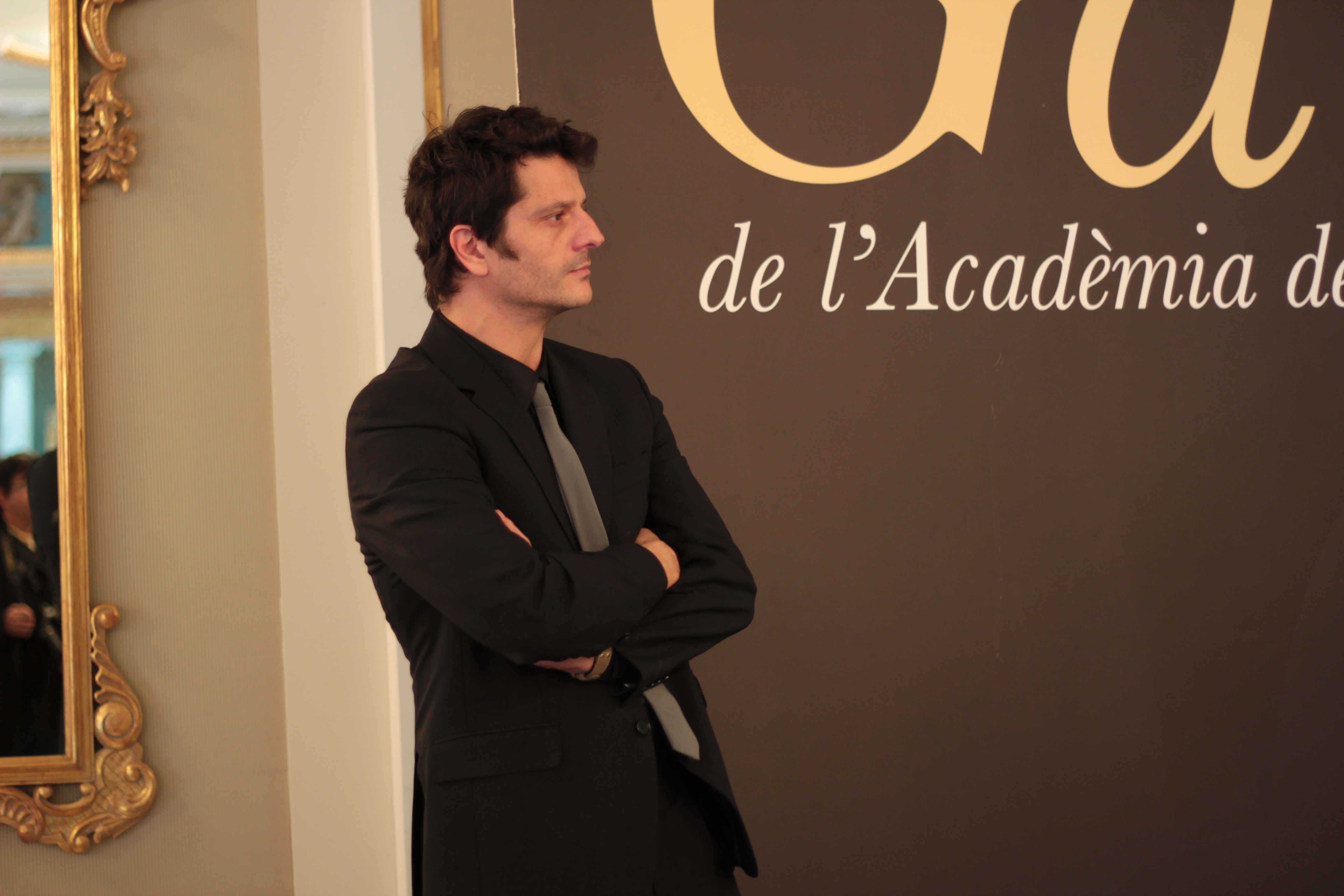 Joel Joan, President de l'Acadèmia a l'acte de presentació dels nominats dels IV premis Gaudí de Cinema Joel Joan, President of Academy, in the event of presentation of the nominees of the IV Gaudí Awards